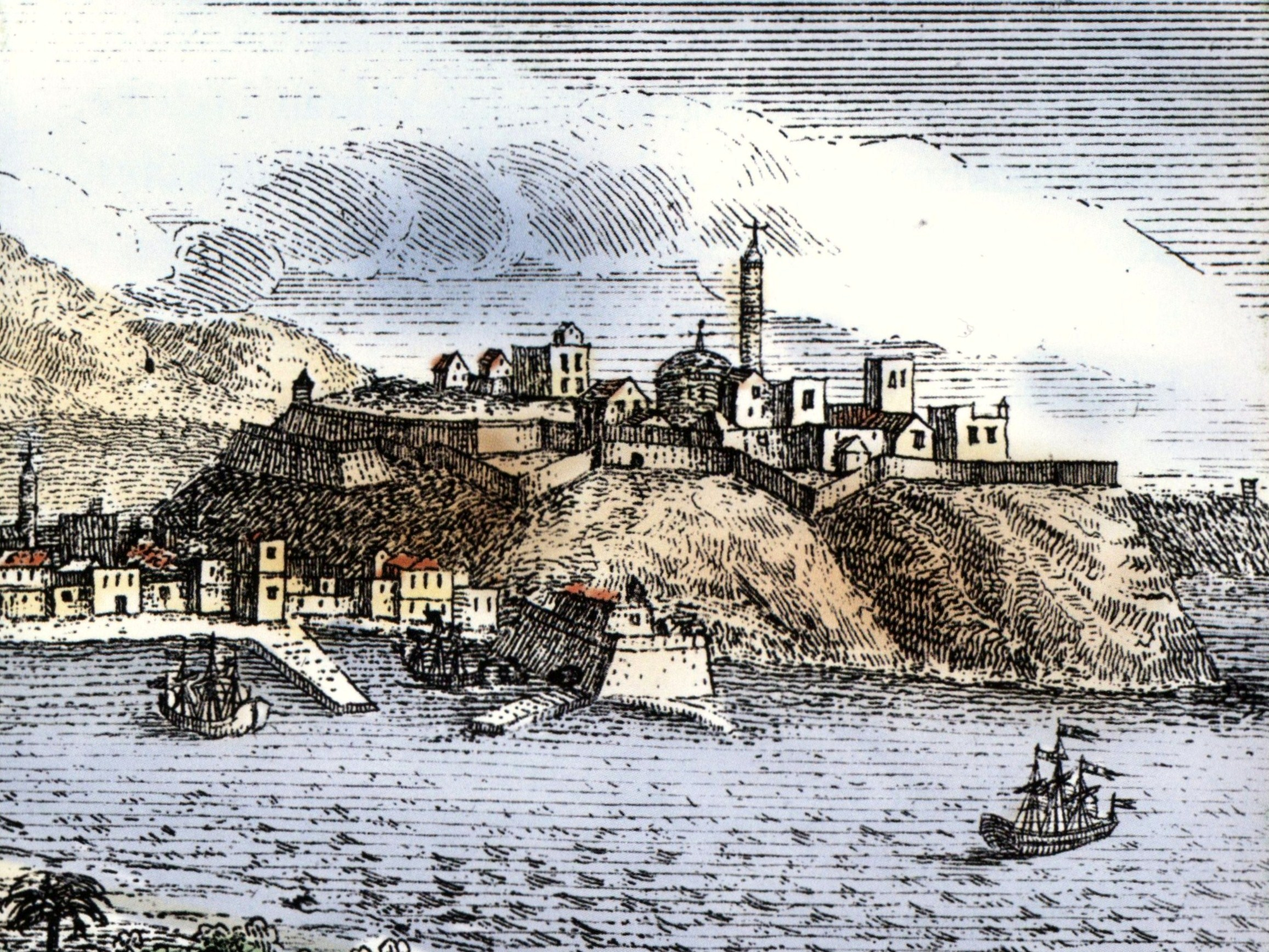 Fortezza von Rethymno auf einem Ausschnitt aus der Zeichnung der Stadt Retimo (Rethymno) aus dem Jahr 1700